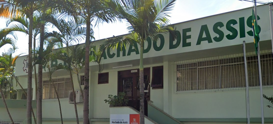 Escola Basica Municipal Machado de Assis